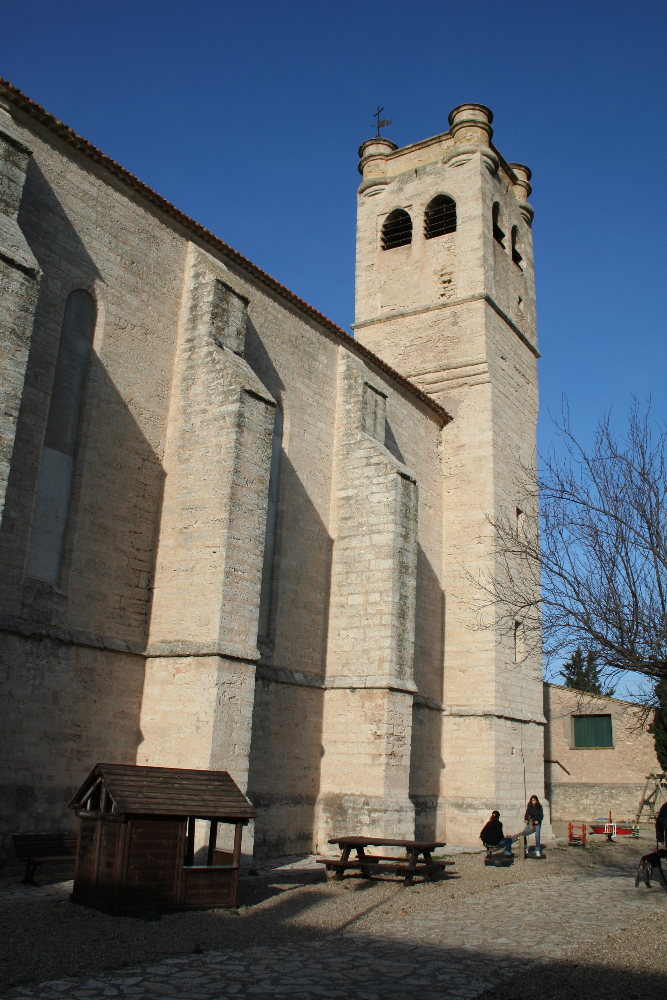 Castelnau-de-Guers (Hérault)- Église Saint-Sulpice.